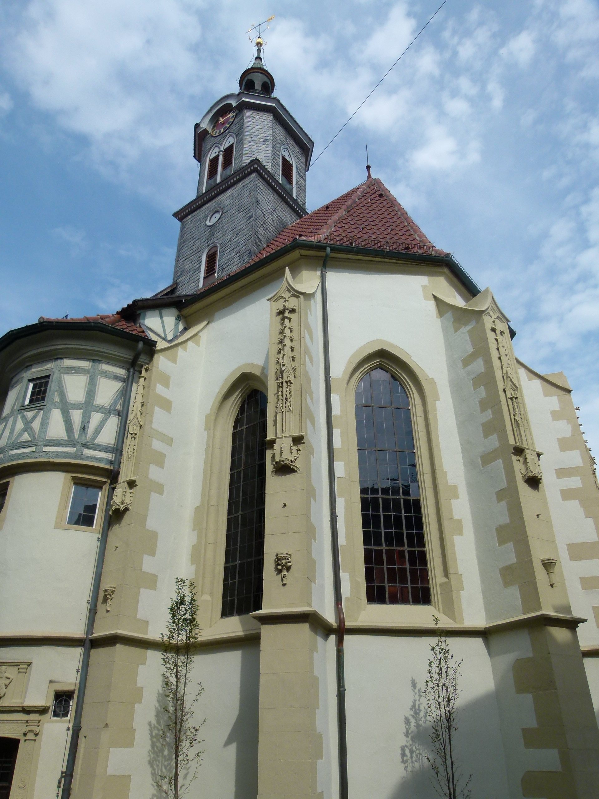 Stadtkirche Marbach am Neckar